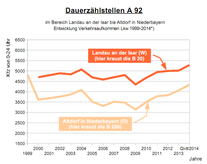 Verkehrsaufkommen Lkw 2004 bis 2014*) auf der A 92 erfasst durch die Dauerzählstellen Nr. 9017 Altdorf (O) und Nr. 9019 Landau an der Isar (W)